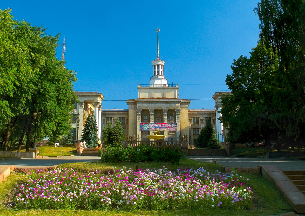 Луганск.Институт Культуры.12 июля 2007